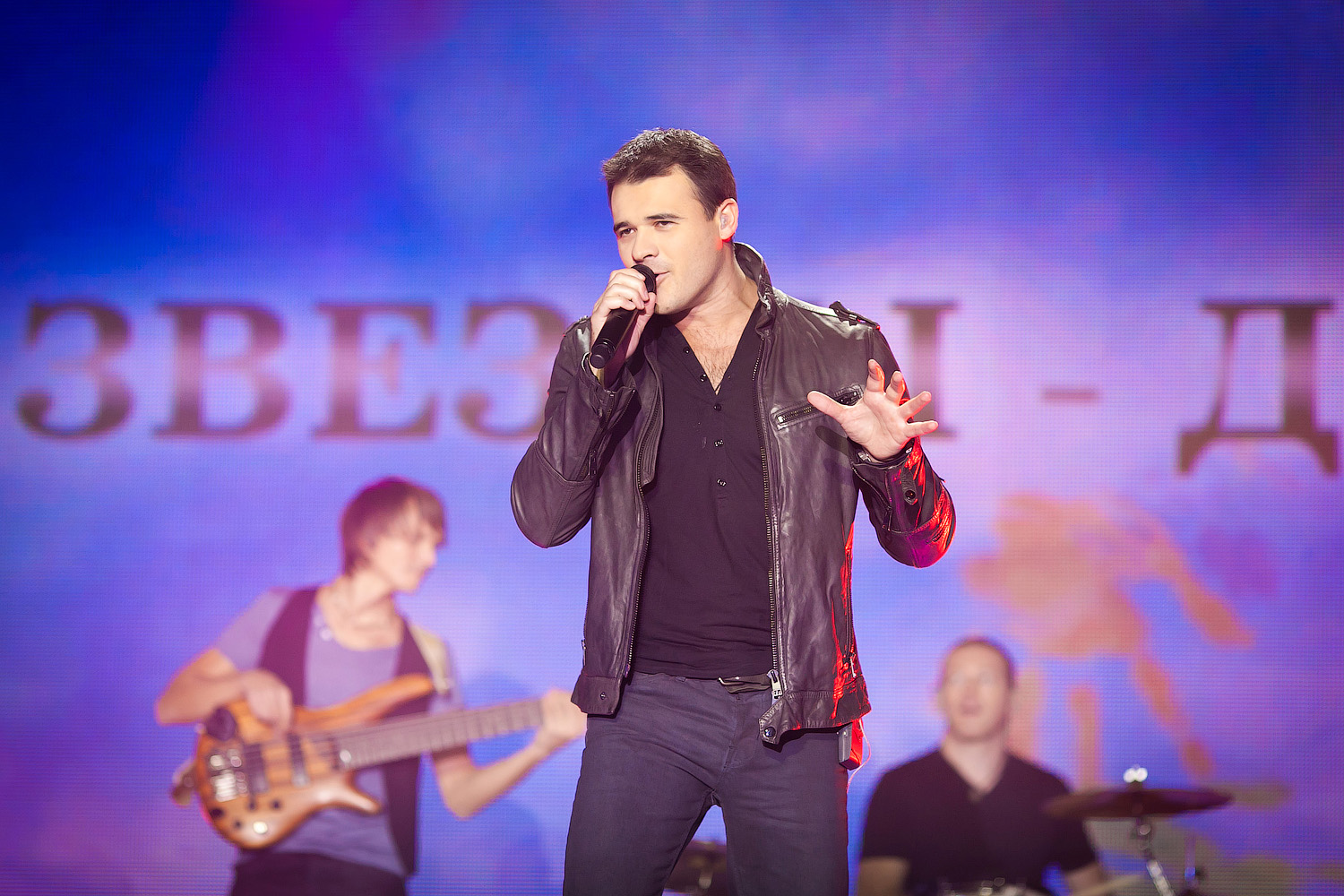 Эмин Агаларов на благотворительном гала-концерте звезд российской эстрады "Звезды - детям" - ночной клуб "Arena Moscow"